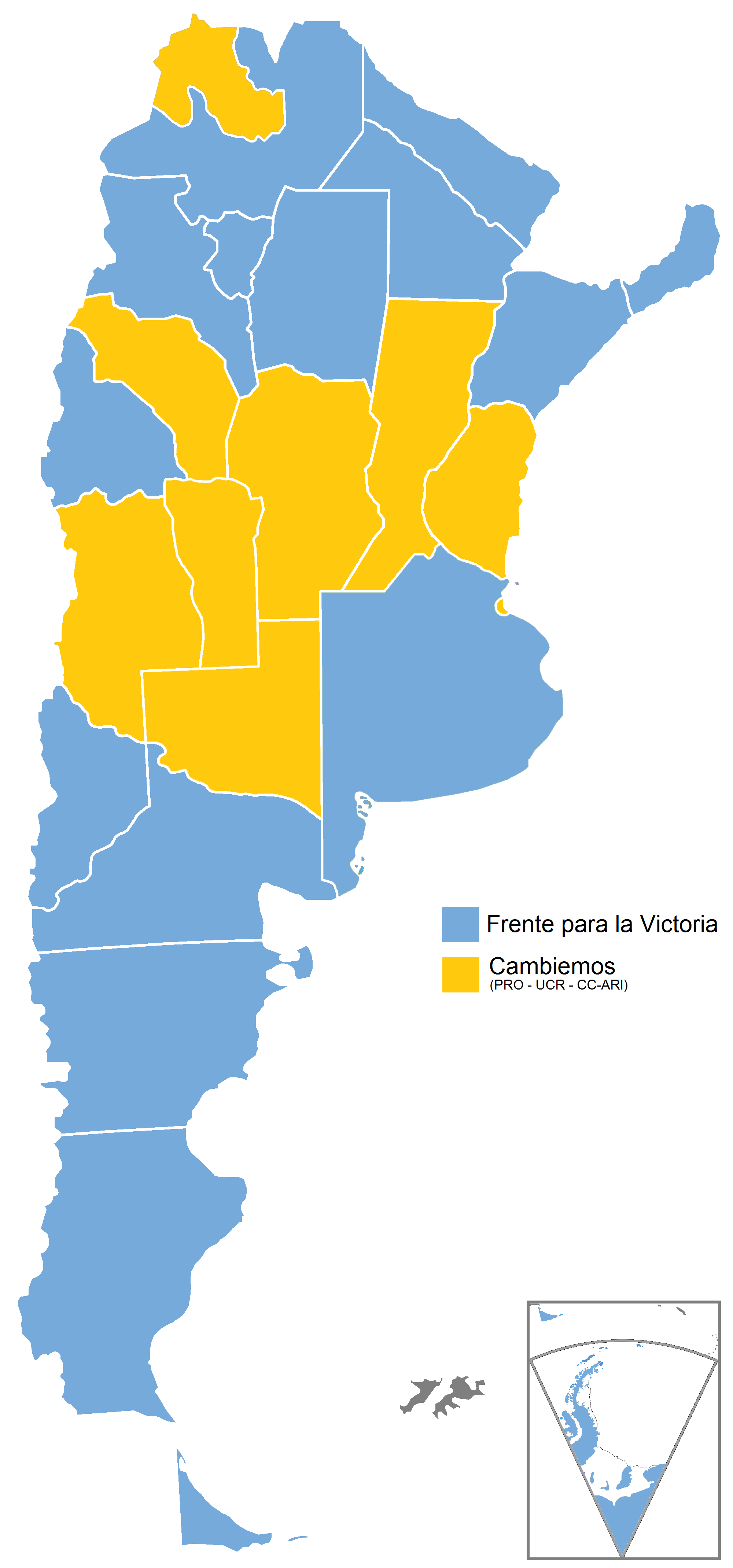 Resultados de la segunda vuelta de las elecciones presidenciales de Argentina de 2015